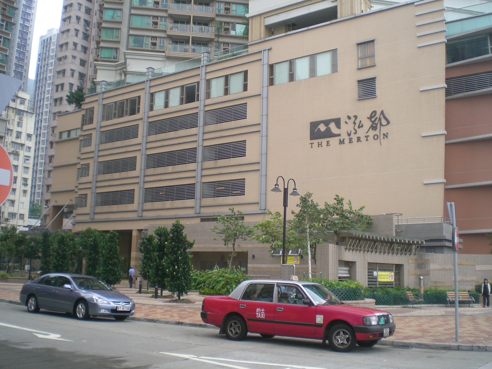 泓都